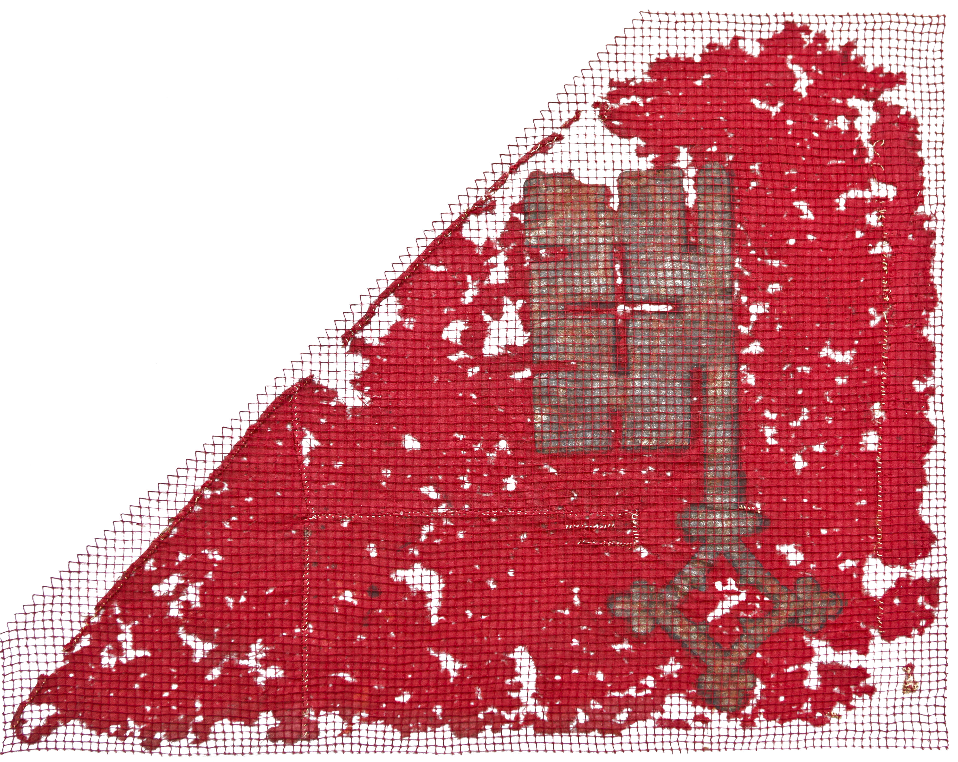 Die älteste Nidwaldner Fahne: Das militärische Feldzeichen, vermutlich aus dem 14. Jahrhundert, zeigt noch den einfachen Schlüssel auf rotem Grund. Erst seit dem 15. Jahrhundert führte Nidwalden den Doppelschlüsse. Foto: Jonas Riedle, Stans. Im Auftrag vom Staatsarchiv Nidwalden. "So zeigt ein Banner aus der Zeit vor 1400 noch den einfachen Schlüssel, wie er auf dem ursprünglichen Siegel erscheint. Die Banner des 15. Jahrhunderts führen dagegen einen Doppelschlüssel" Emil Weber, Die Entstehung des Nidwaldner Wappens, Juli 2019 [1]